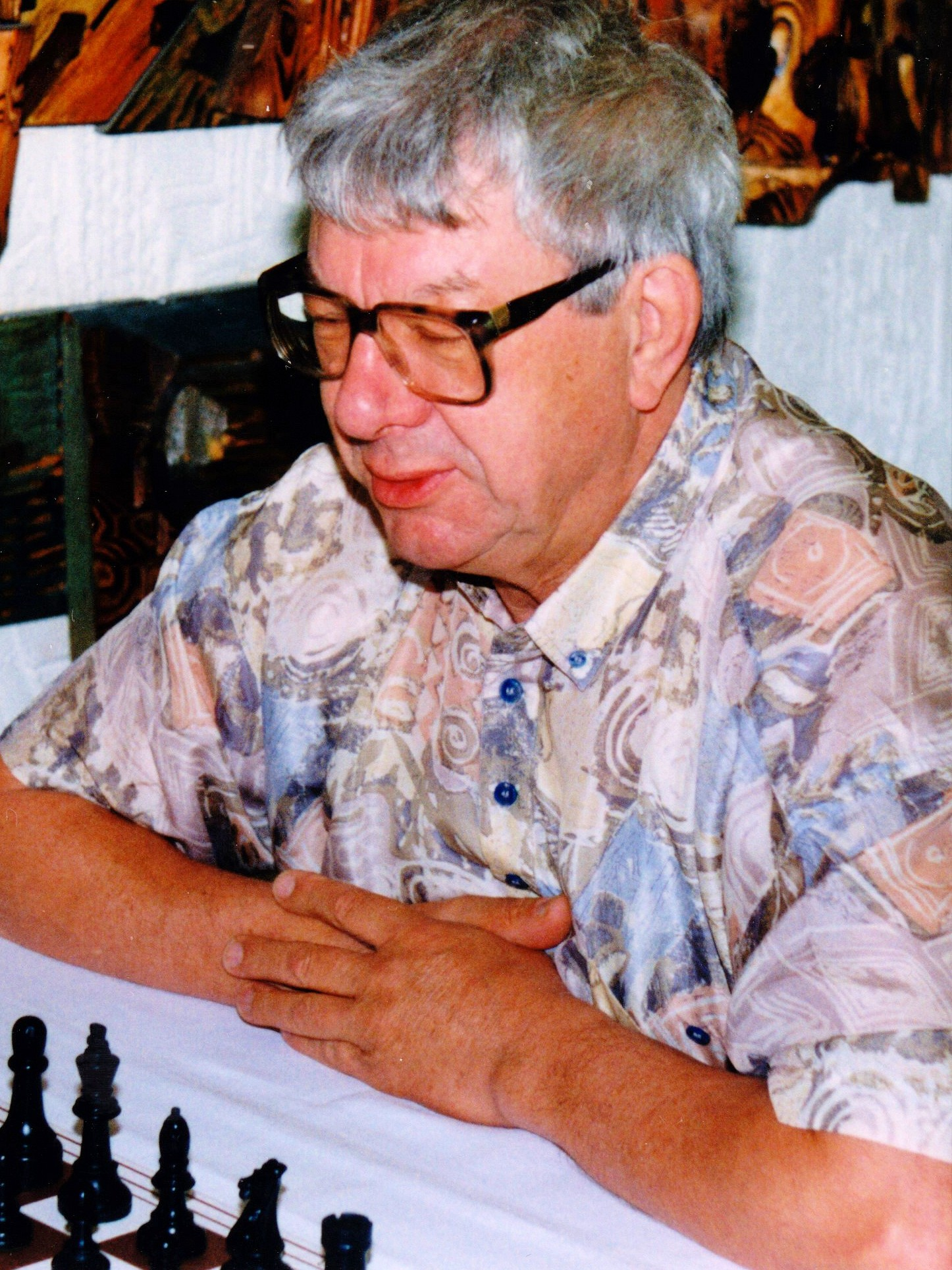 Manfred Dornieden, Deutsche Seniorenmeisterschaften 1996 im Schach.